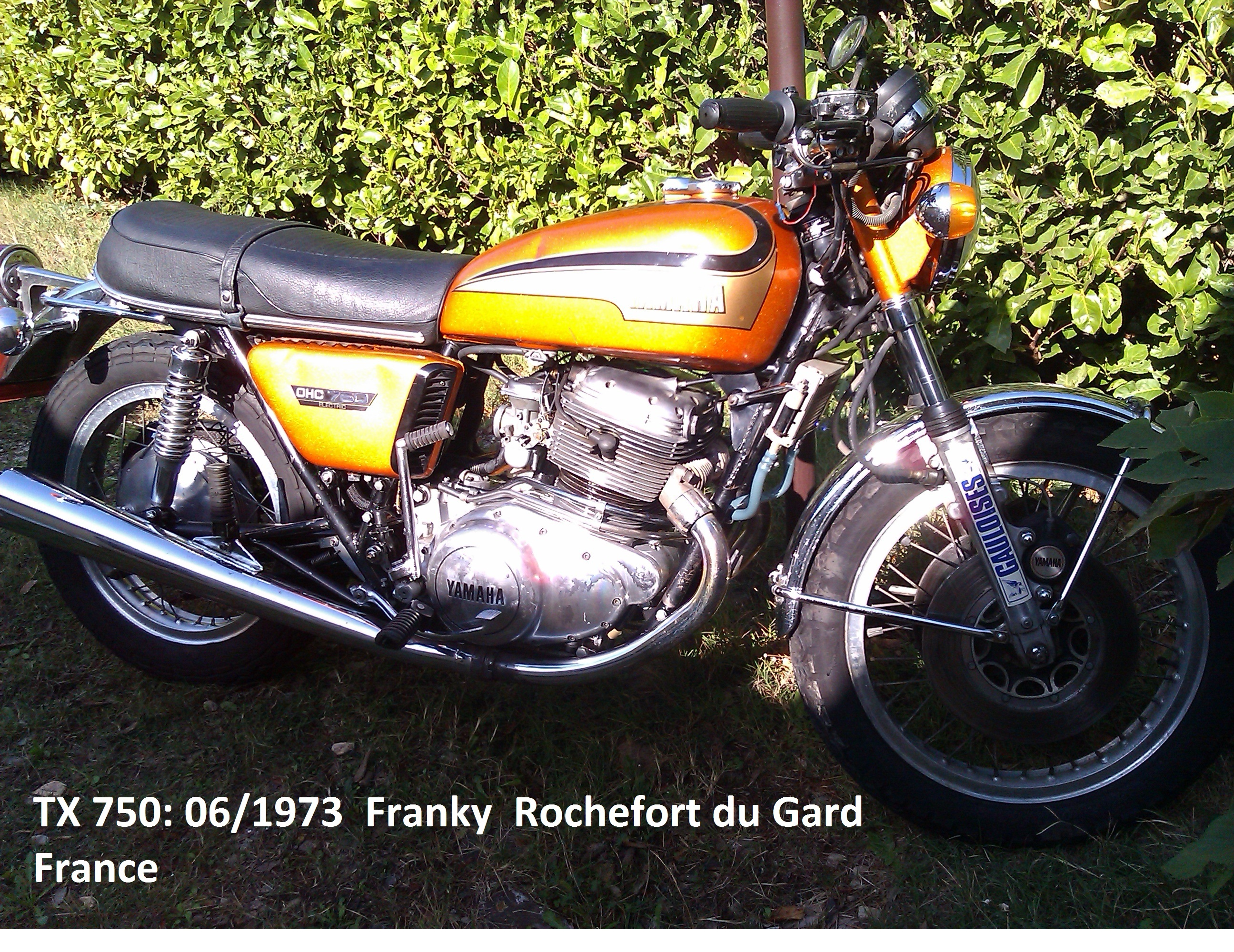 moto en cour de renovation aprés 20ans de remise